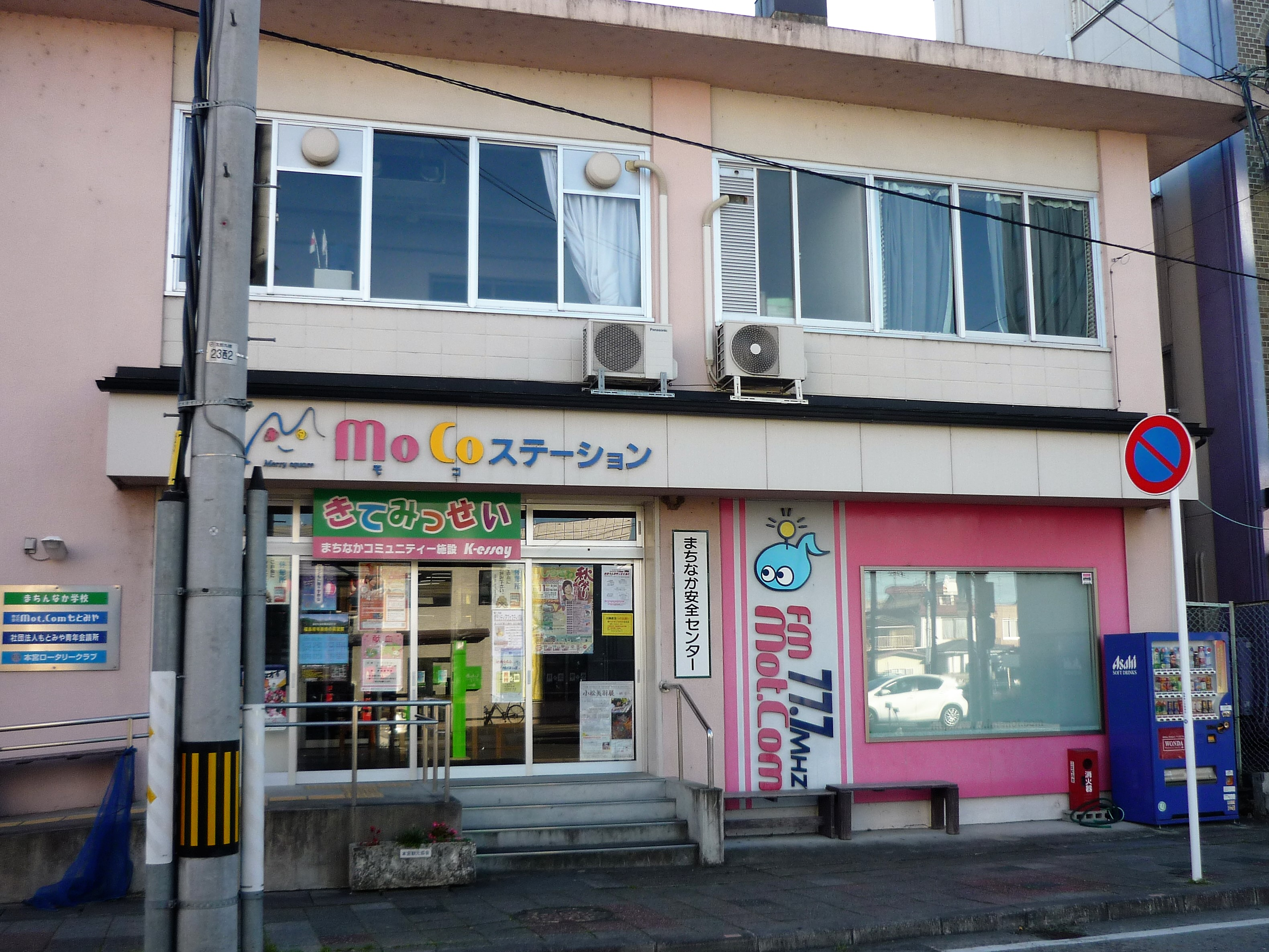 Mot.comもとみや Panasonic Lumix DMC-FS3